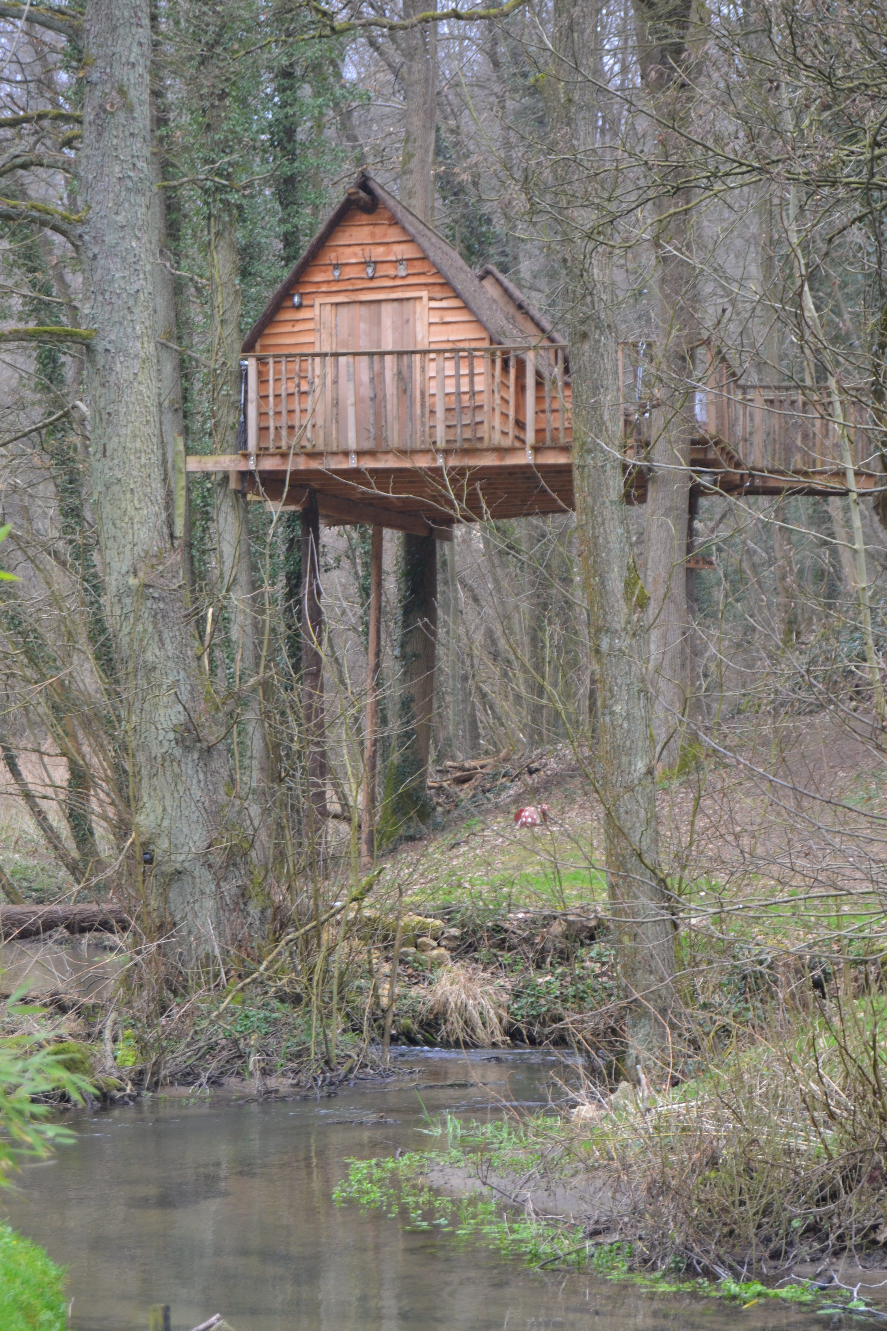 La cabane de Diego au-dessus de la Leffe. Moulin de Lisogne